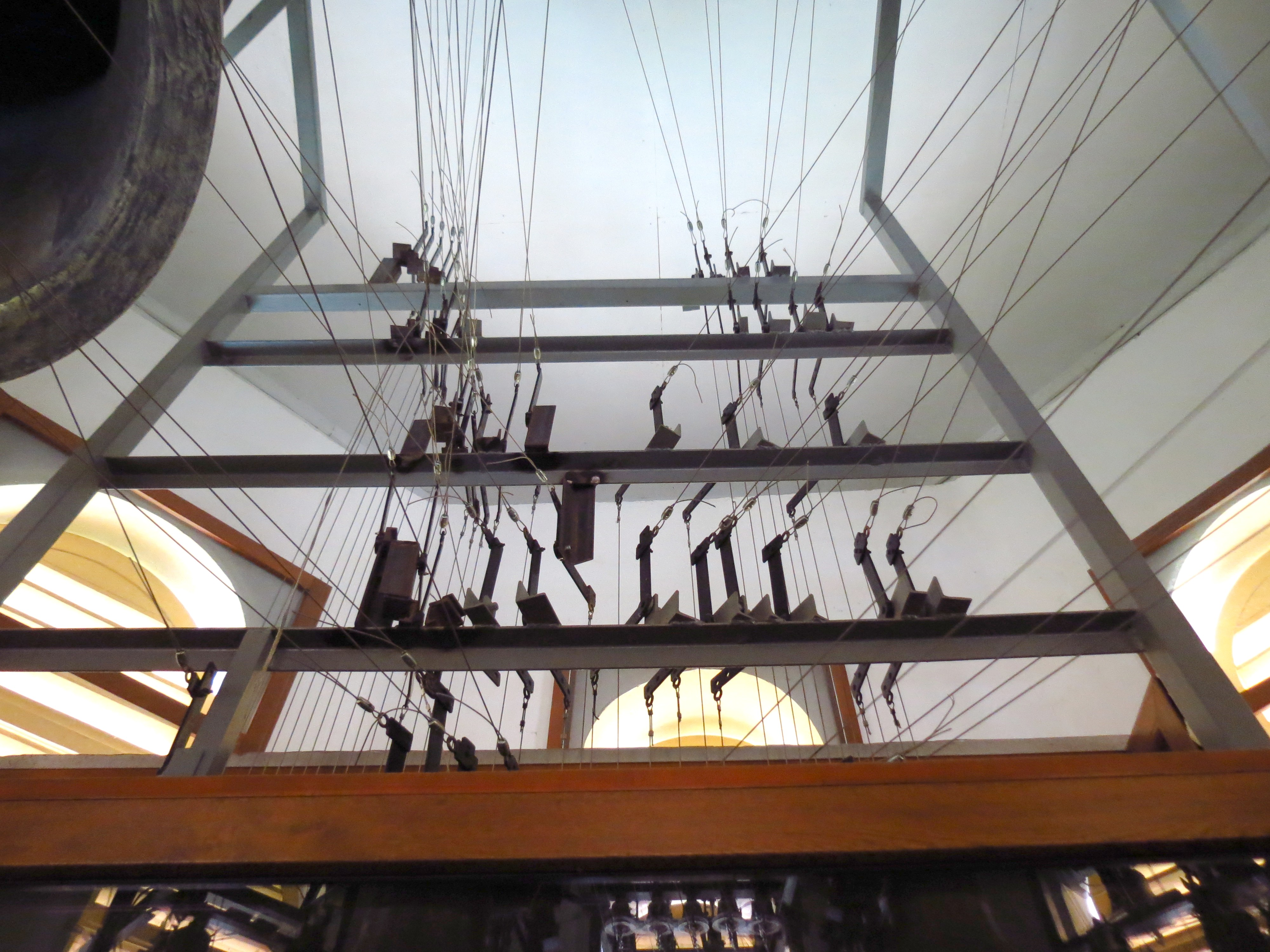 Механізм карильону Гошівського монастиря (греко-католицькому монастирі Чину св. Василія Великого у селі Гошеві Долинського району Івано-Франківської області). Гошівський карильйон – це другий карильйон в Україні. Станом на травень 2015 року Гошівський карильйон складається з 52 дзвонів, на яких можна виконати церковні мелодії чи твори класичної музики. Карильйоном може керувати як людина (для цього він обладнаний спеціальною клавіатурою), так і комп'ютер. Тому місцеві жителі інколи назвають цей карильйон "електронними дзвонами". Дзвони для цього карильйону відливали у Бельгії на пожертви приватних осіб. Їх імена викарбувані на дзвонах. Перший ювілейний дзвін було встановлено та освячено 5 серпня 2012 року з нагоди 275-ї річниці перенесення чудотворної ікони Гошівської Матері Божої до монастиря.